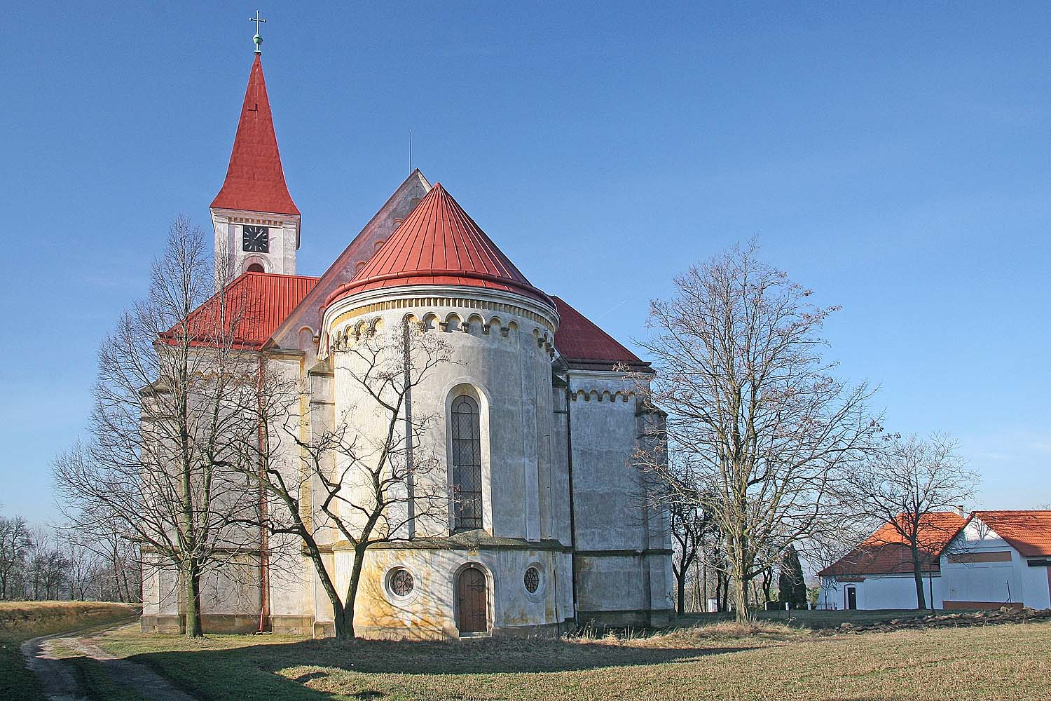 Vrbice - kostel Nanebevzetí Panny Marie, district Nymburk autor:prazak date:17. 2. 2007